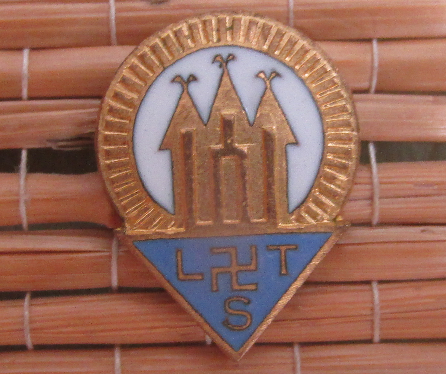 1940 m. Lietuvių tautininkų sąjungos segtukas su svastika. Iš Petro Stankero rinkinio.